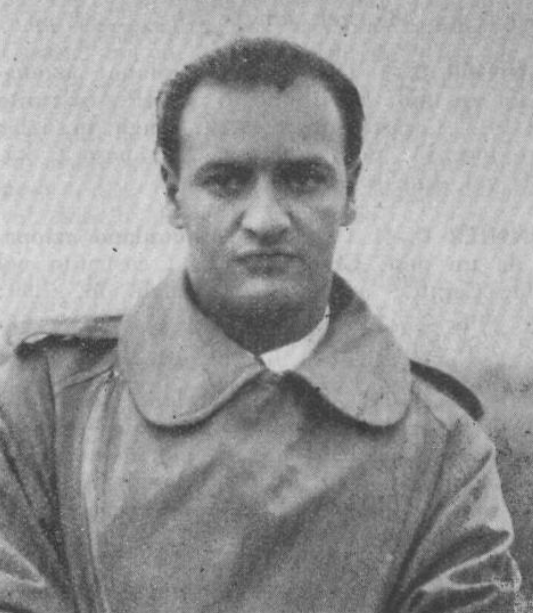 Aviatore italiano